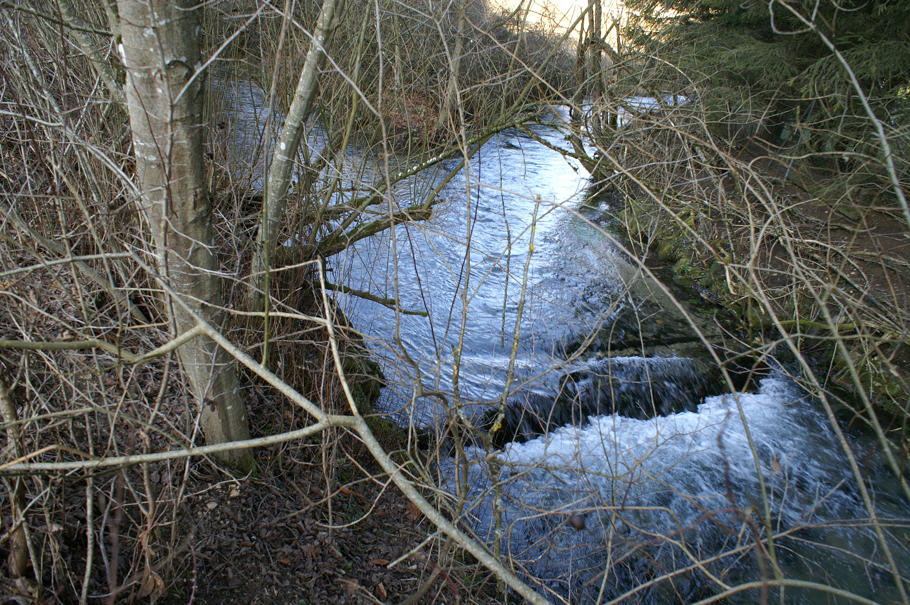 Die Urspring mündet nur etwa 500 Meter nach ihrem Quelltopf in die Ach